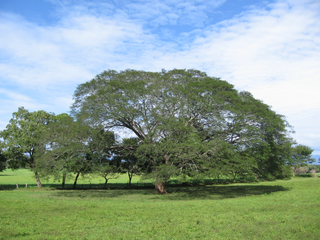 Este es el Árbol de Guanacaste (símbolo patrio de Costa Rica). Este ejemplar se encuentra cerca de Colorado de Abangares, en Guanacaste, Costa Rica.